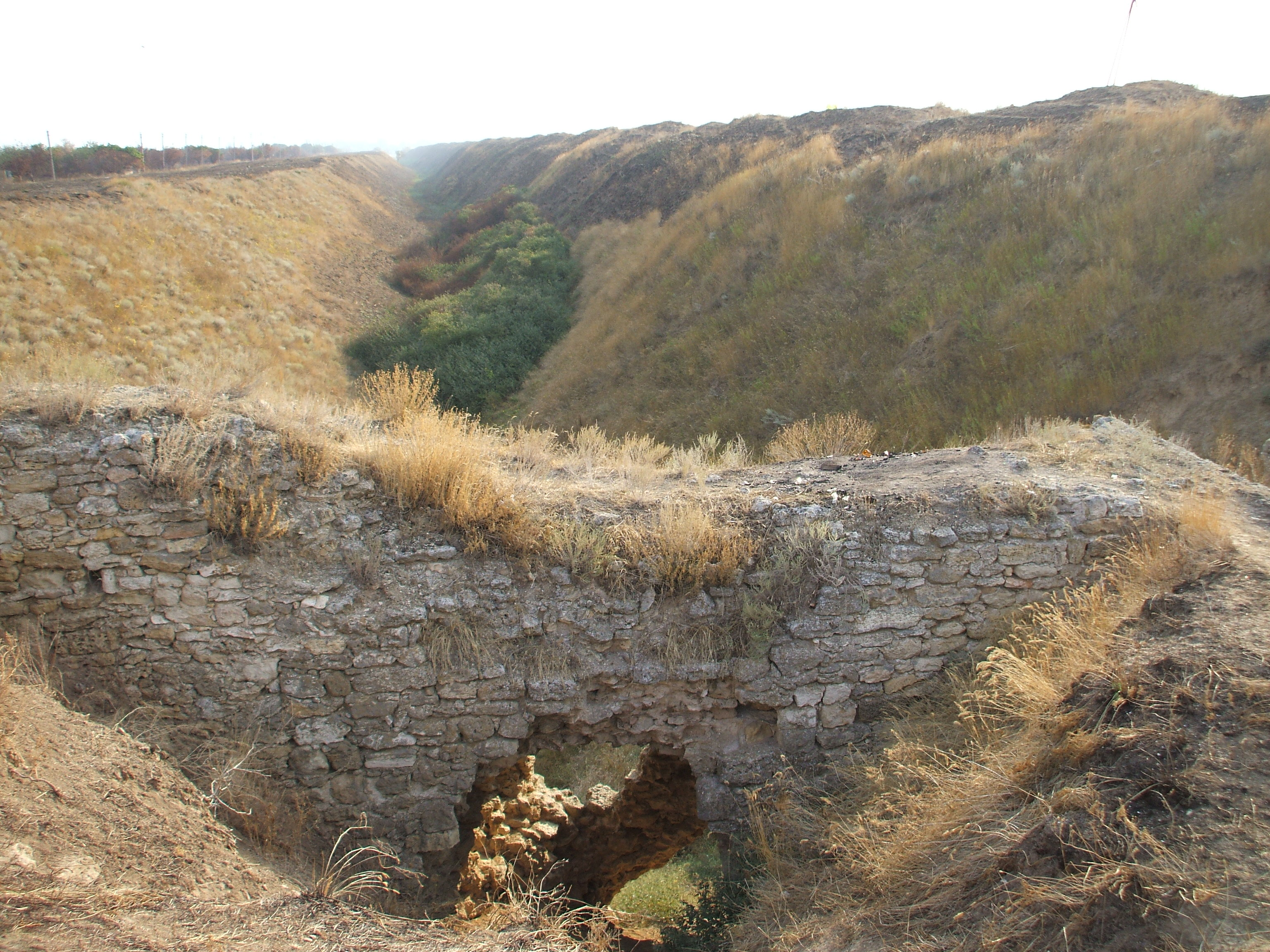 Часть сохранившихся валов и рва на Перекопском перешейке со стороны Чёрного моря.